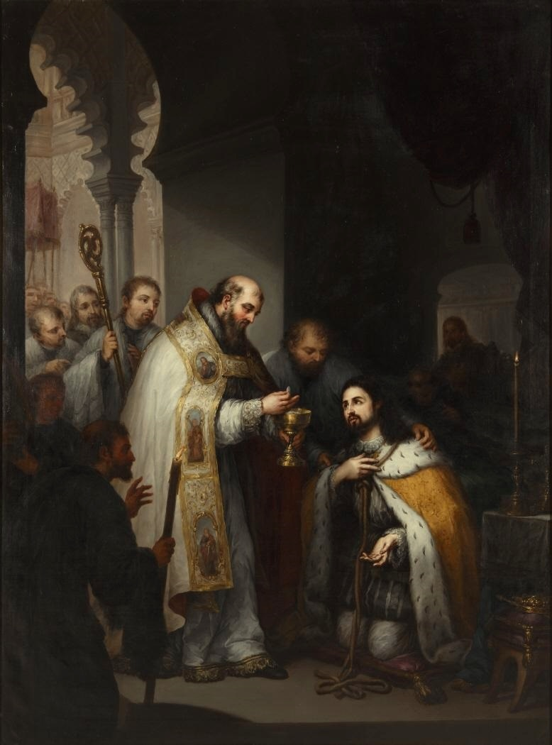 La obra representa la última comunión del rey Fernando III de Castilla († 1252), apodado el Santo, que falleció en la ciudad de Sevilla el día 30 de mayo de 1252.